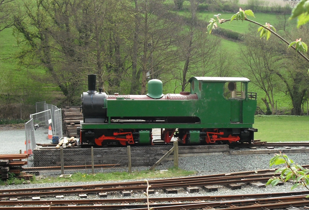 Bagnall-Meyer locomotive